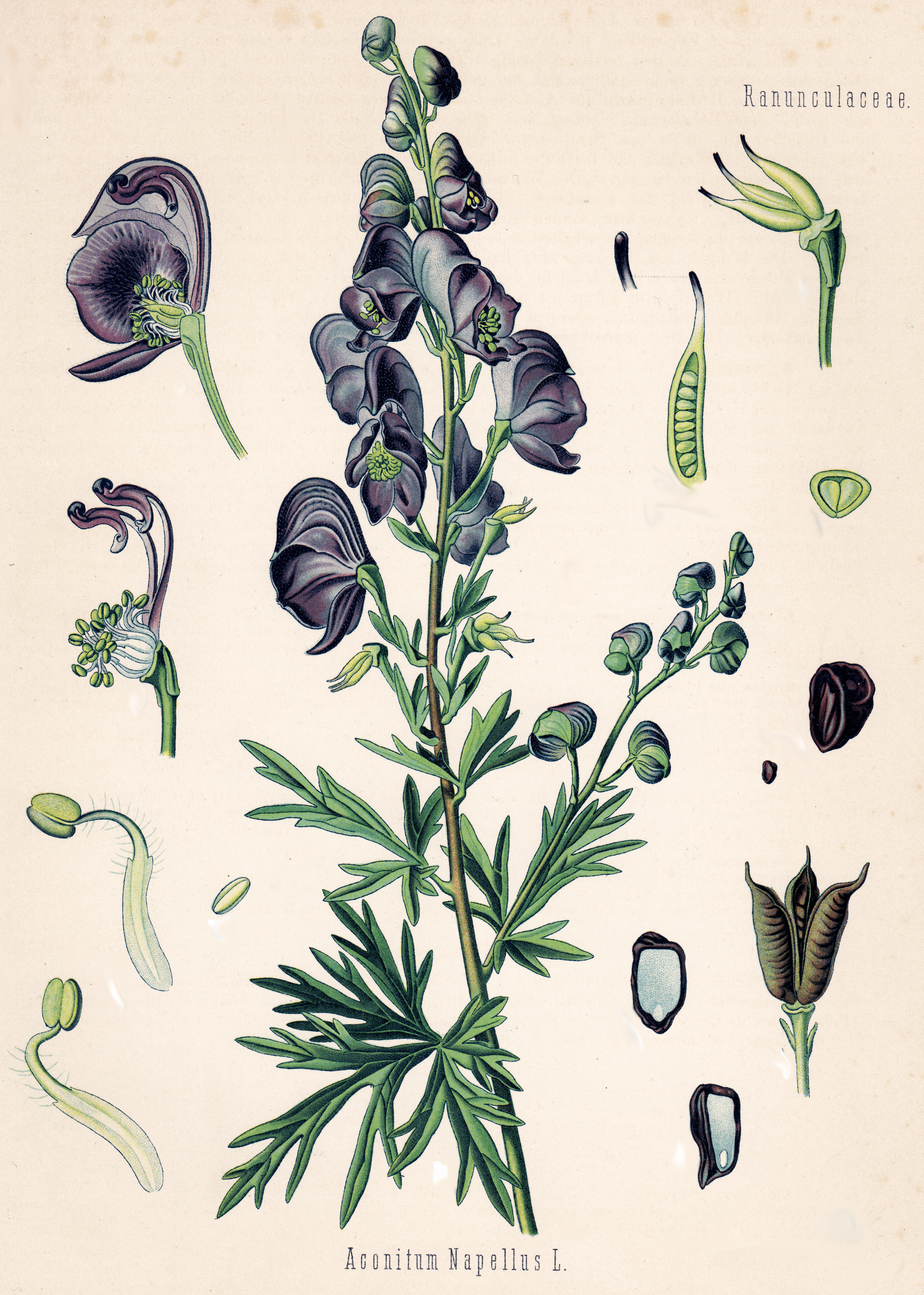 Abbildung des Blauen Eisenhuts